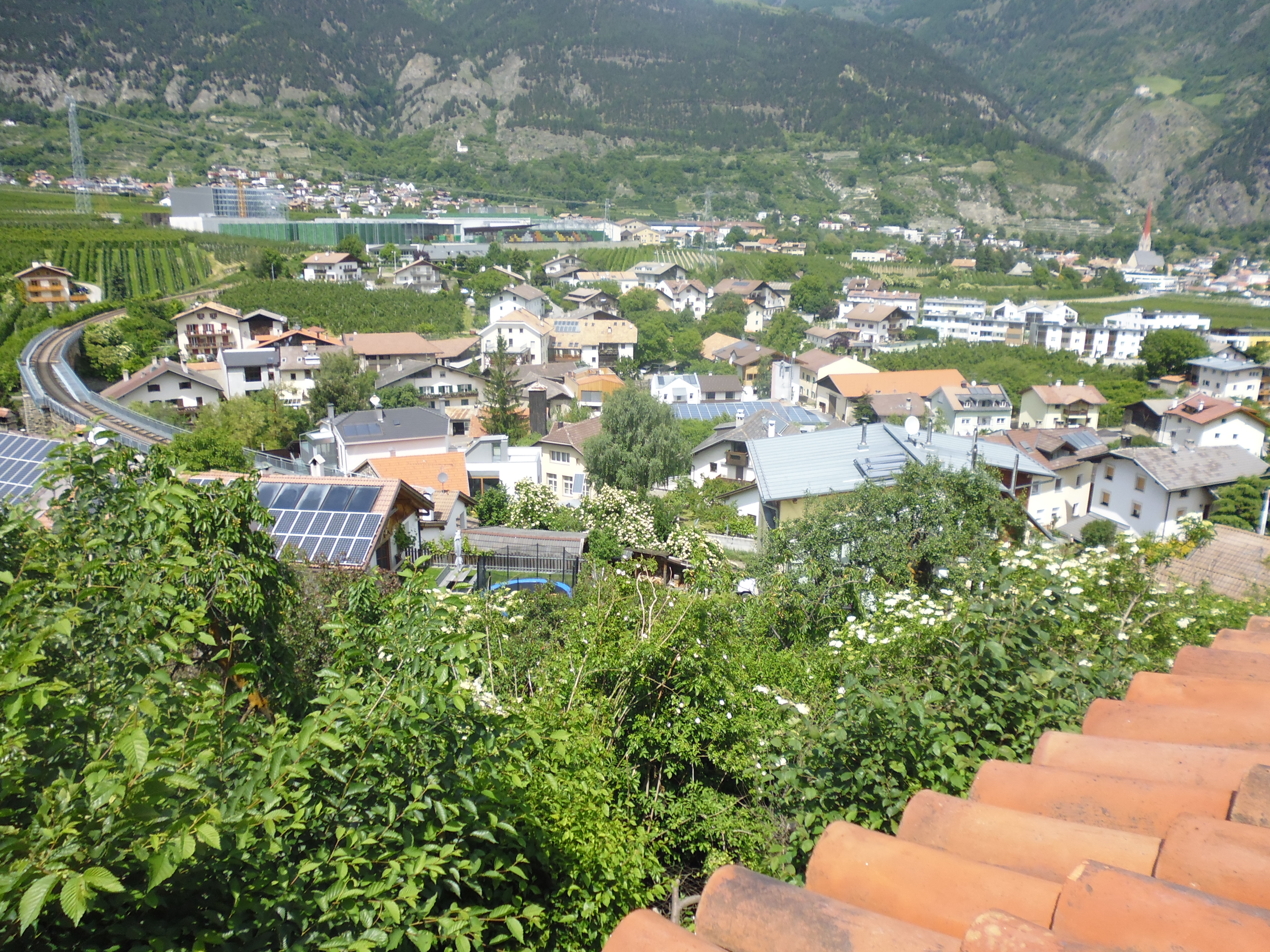 Ansichten von Göflan